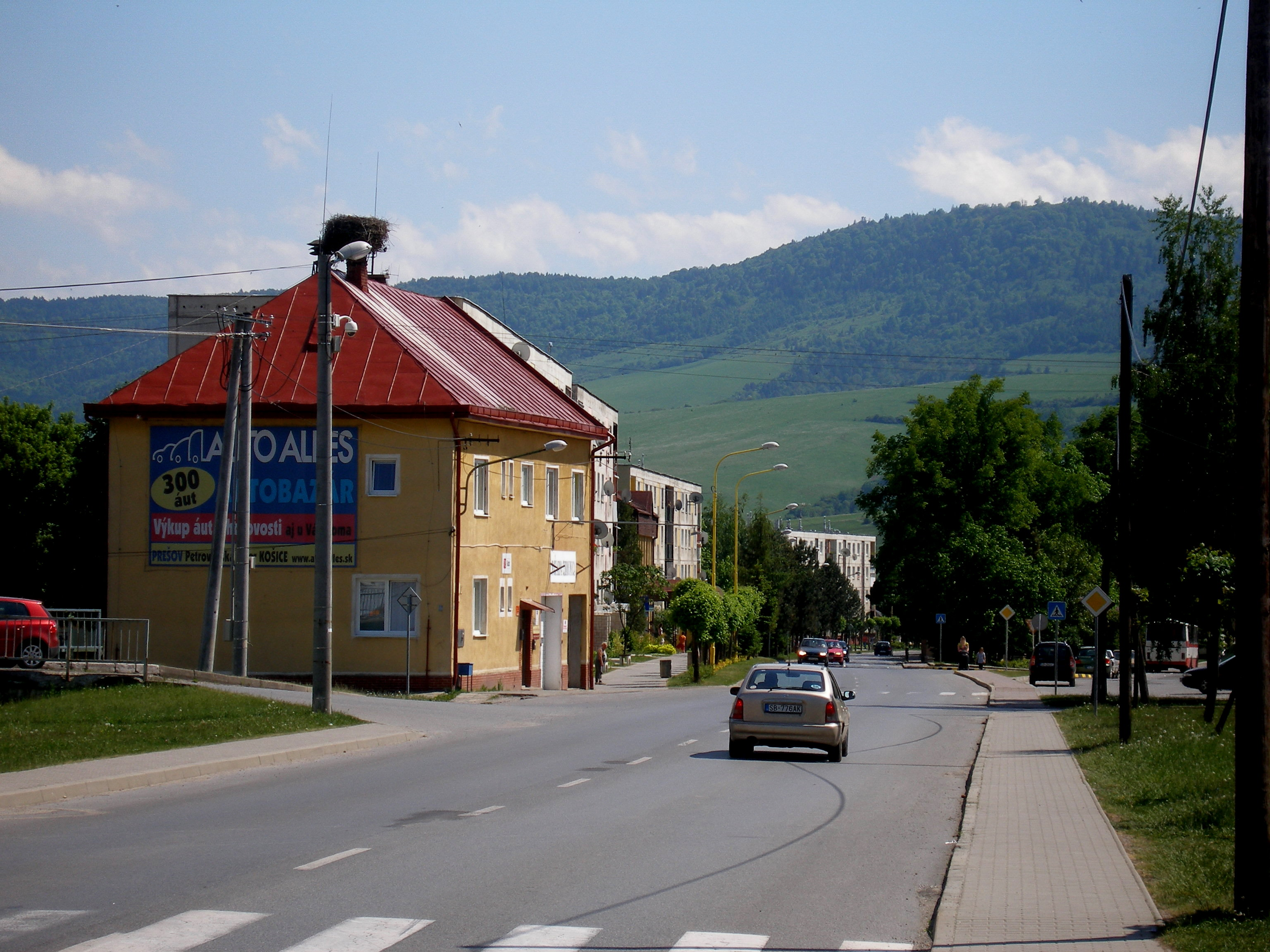 Mesto Lipany v okrese Sabinov.